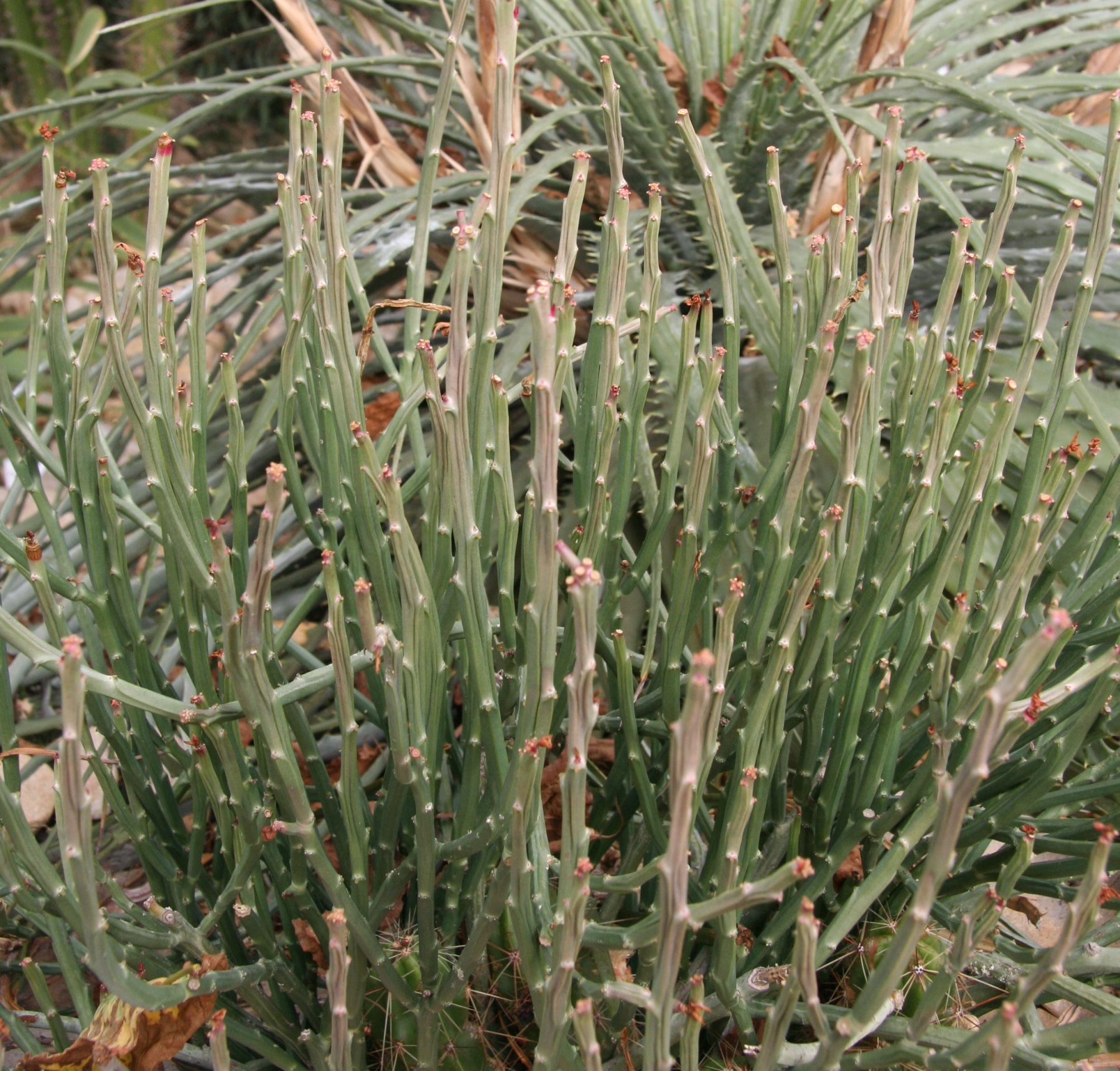 Euphorbia pteroneura im Botanischen Garten Dresden